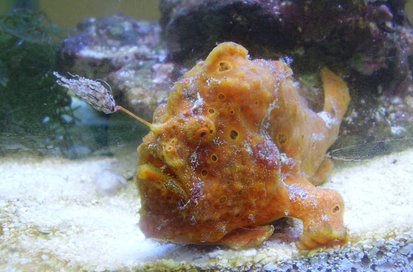 Antennarius pictus w Akwarium Gdyńskim